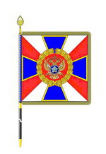 Штандарт Директора Службы внешней разведки Российской Федерации Учрежден Указом Президента Российской Федерации от 13 марта 2000 г. № 485 "О личных штандартах"